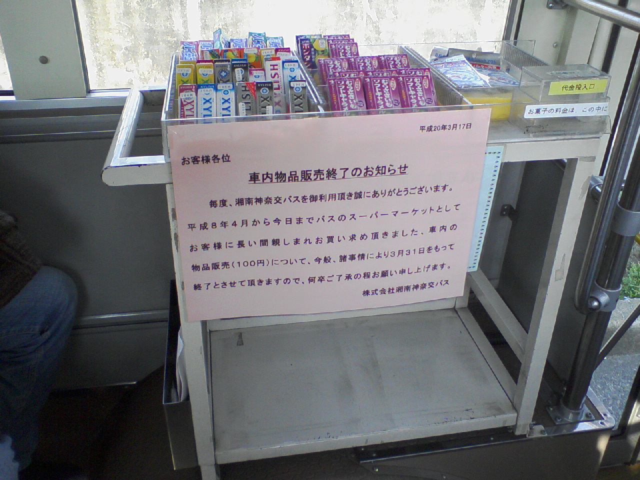 車内販売ブース